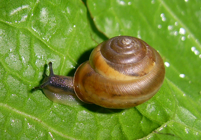 Равлик зернистий карпатський Monachoides vicina (Rossmässler, 1842)